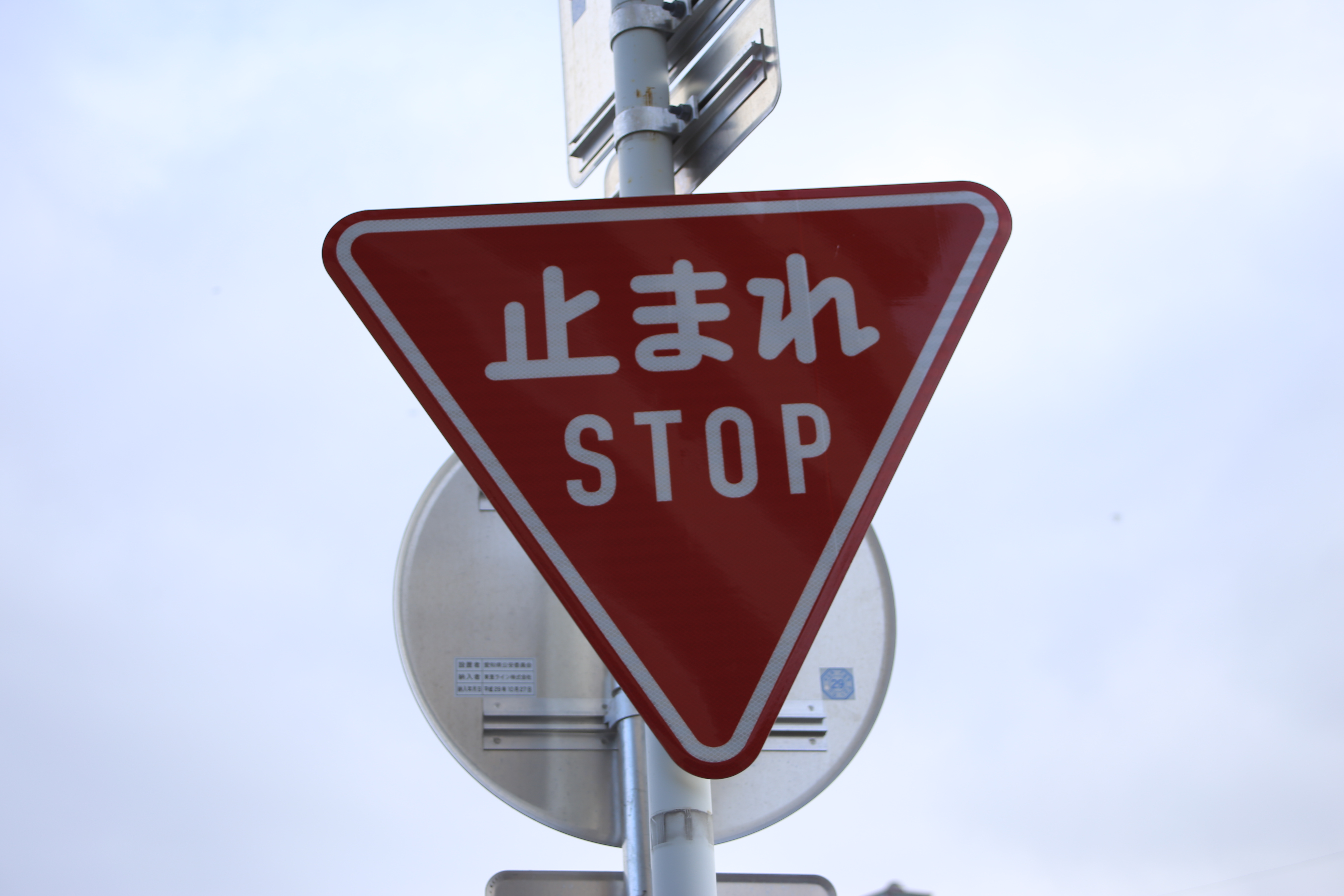 「止まれ」と「STOP」が併記された日本の道路標識